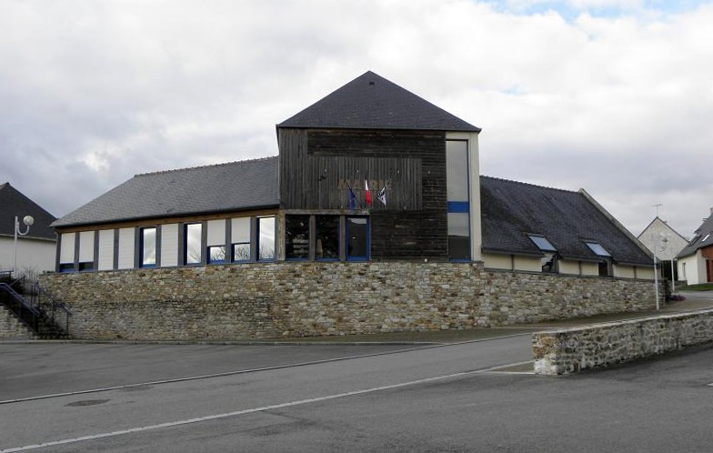 Mairie de Pocé-les-Bois (Ille-et-Vilaine, Bretagne, France).